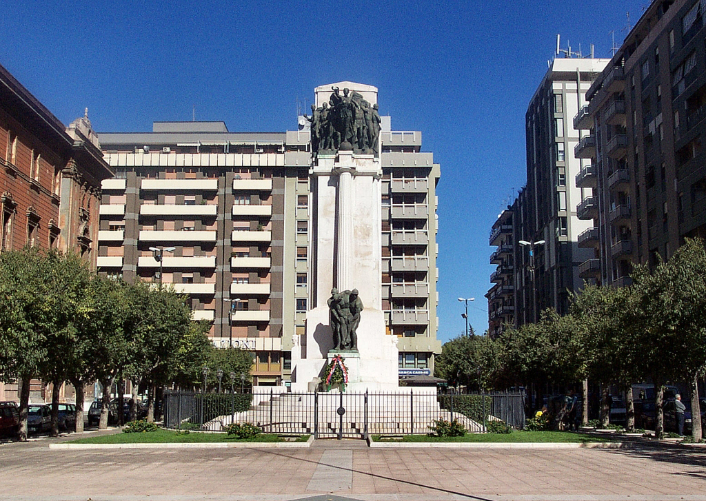 Monumento ai Caduti in guerra di Taranto - Foto concessa dall'Autore - Il Sig. Gaspare Ressa, detentore del copyright sull'immagine, ha esplicitamente rilasciato l'immagine con Licenza Arte Libera e mi ha autorizzato a caricarla su Wikipedia con tale licenza.